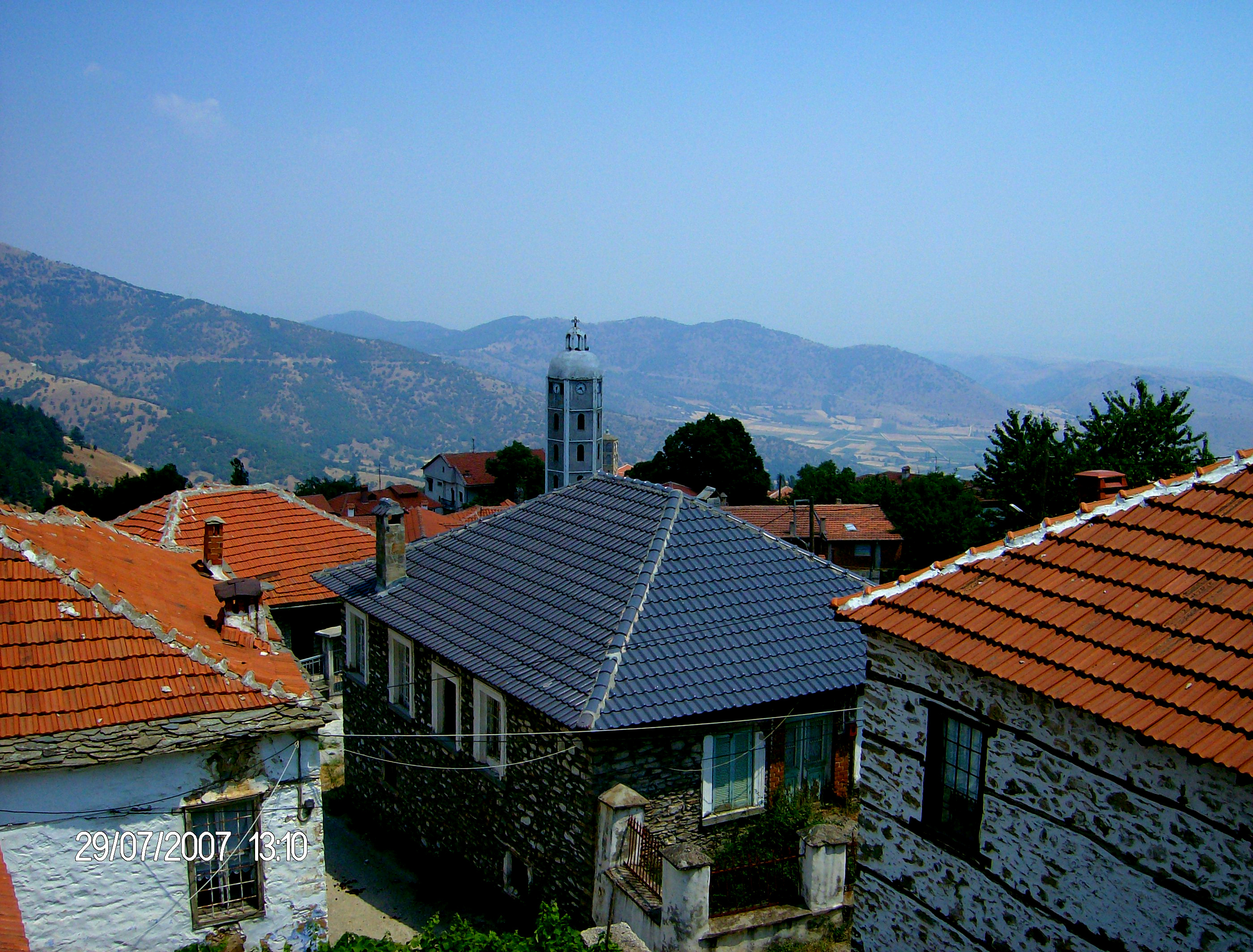 kastoria-kλεισουρα 1250μ υψομετρο-Θεα απο το σπιτι της χριστινας